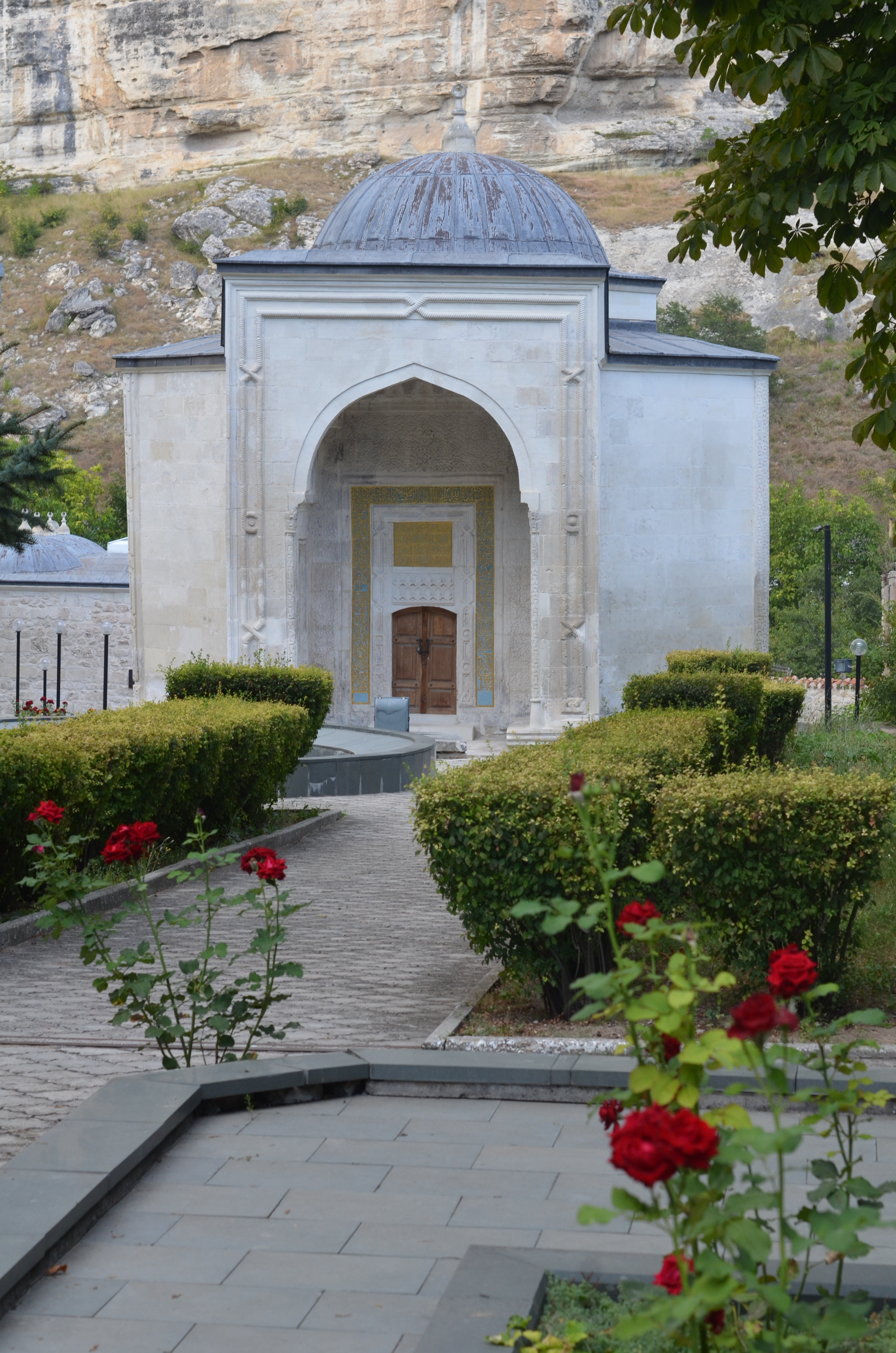 Гробница Дюрбе Хаджи Гирея: улица Басенко, 57, литер "О", Бахчисарай, Бахчисарайский район, Крым This object is located on the Crimean Peninsula and recognized as cultural heritage by both Russia and Ukraine under the monument ID: 8230072000/ 01-204-0003, respectively. The legal status of the Crimean region is currently disputed.